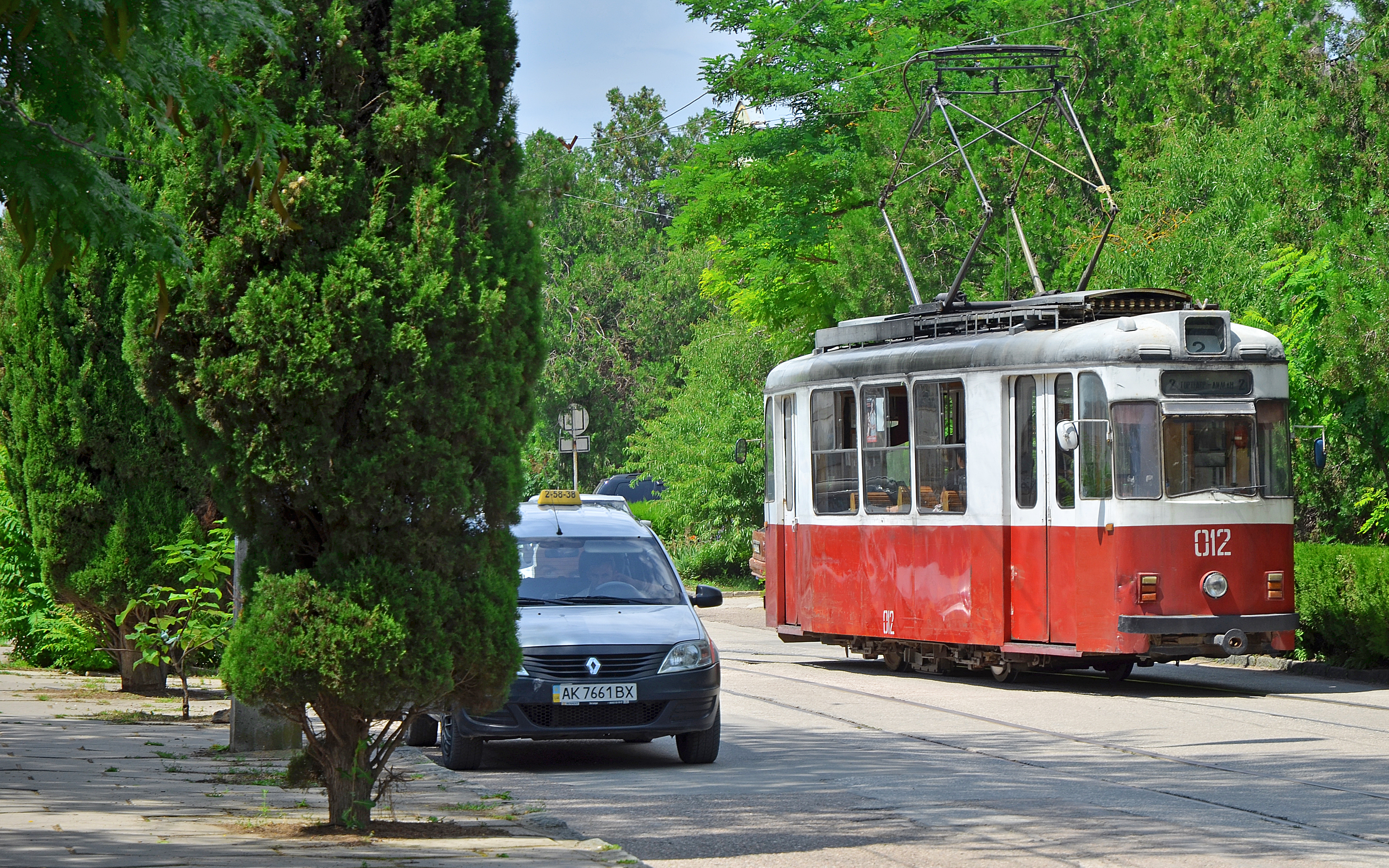 Подробнее здесь